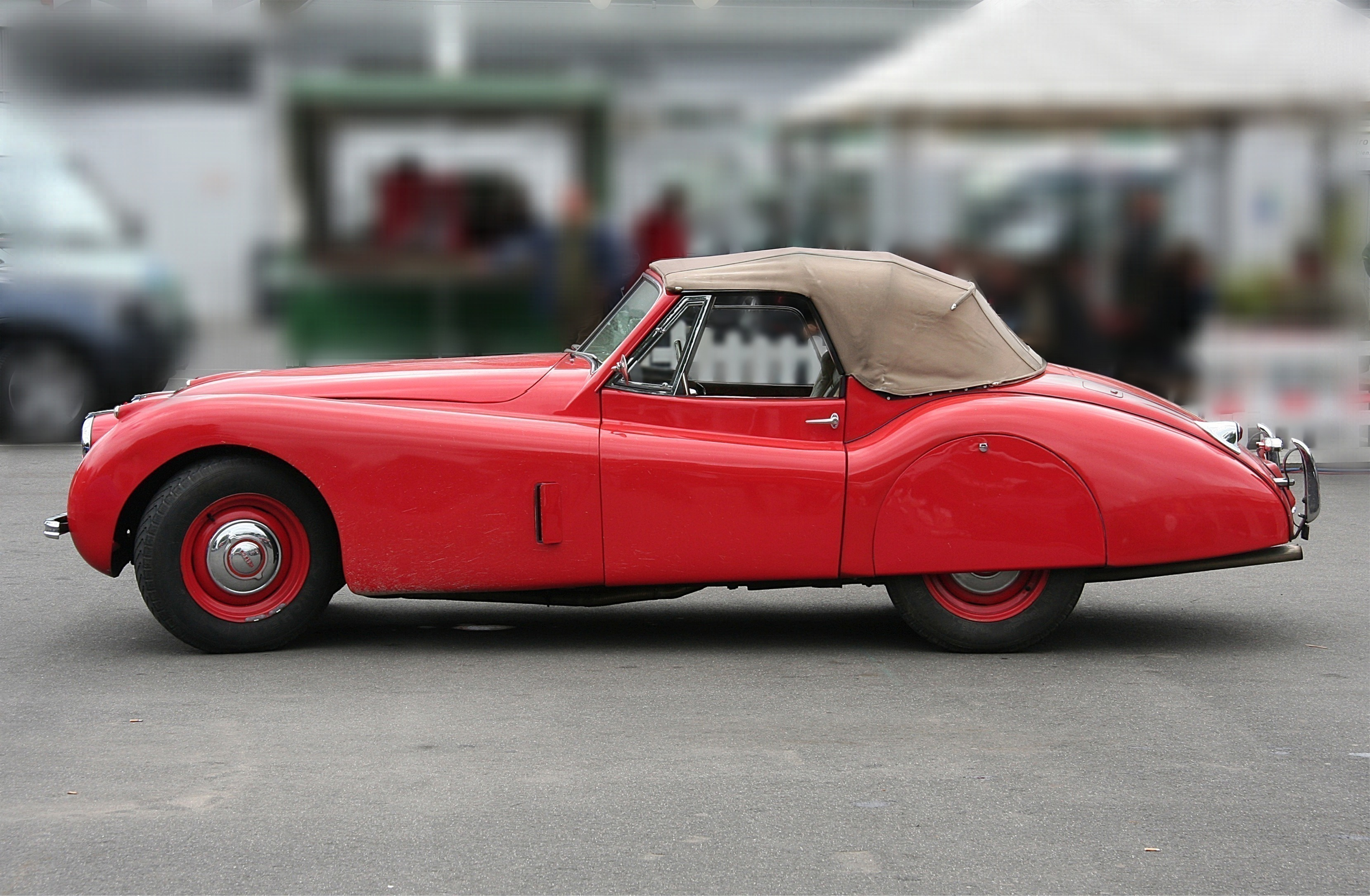 Jaguar XK 120 DHC, Baujahr 1953 (Seitenansicht)